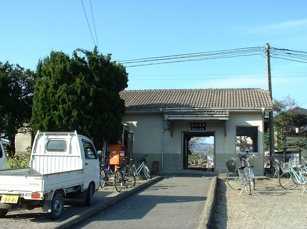 徳島線西麻植駅